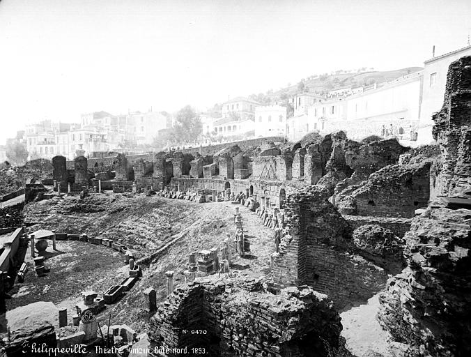 Théâtre de Skikda (anciennement appelée Philippeville), côté nord, Algérie